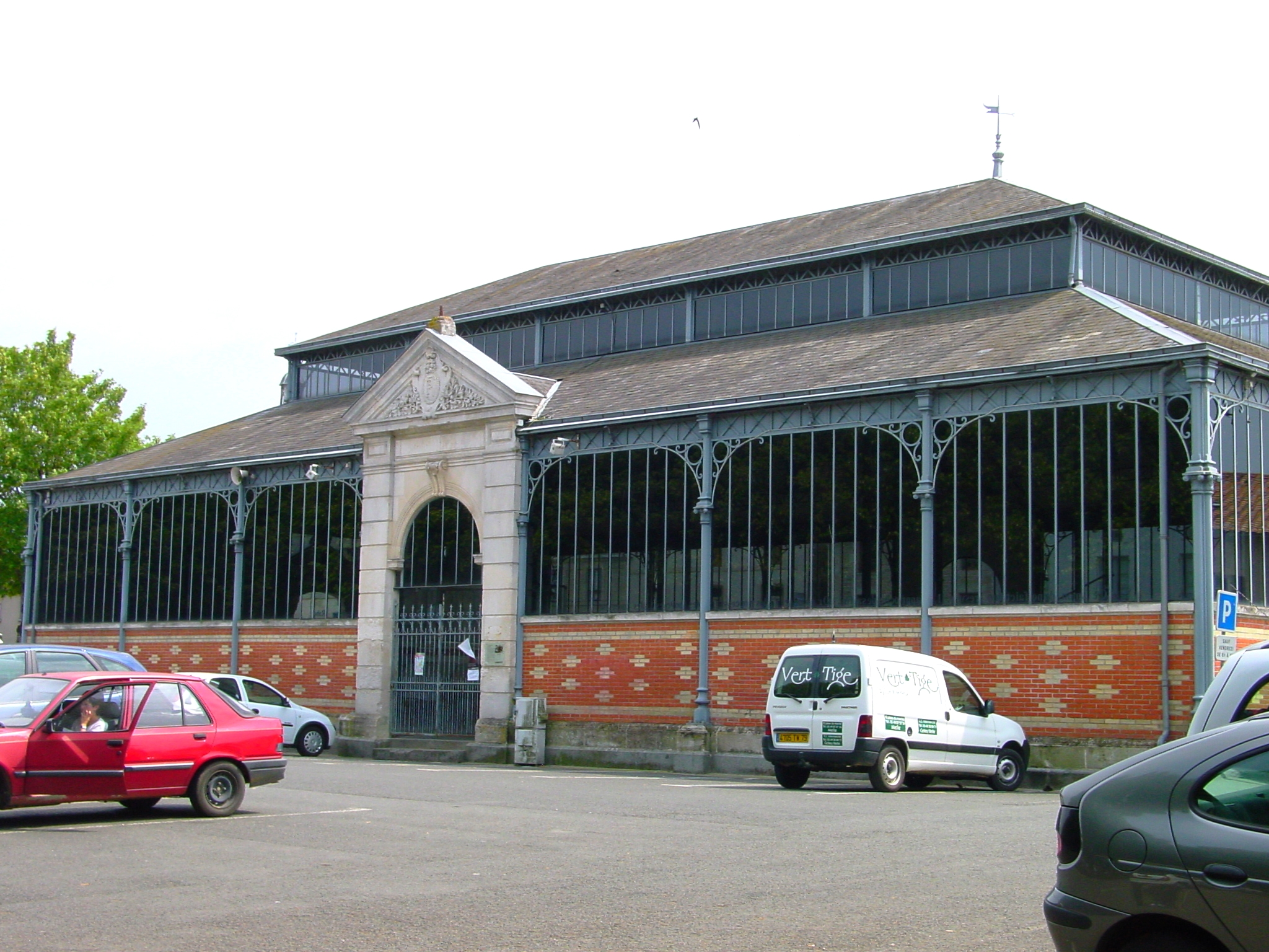 Halles métalliques de l'architecte Mongeaud, construite en 1903 en remplacement de halles en bois.